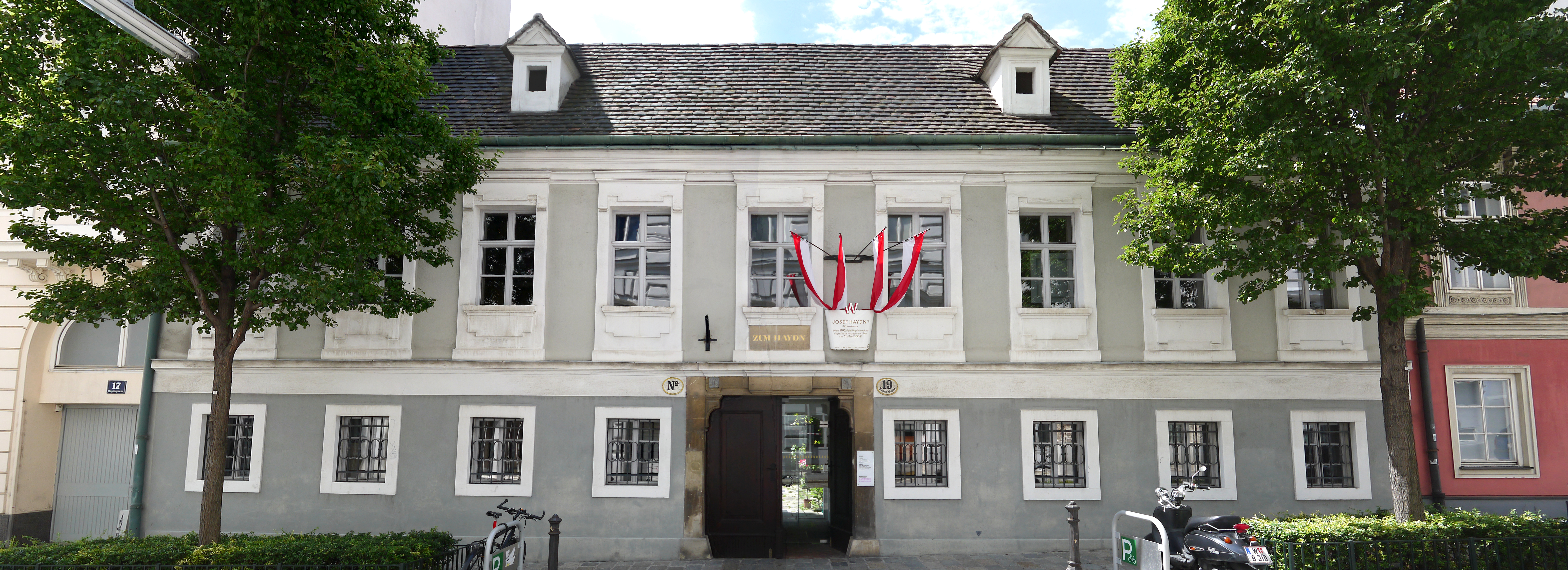 Wohnhaus, Zum Haydn